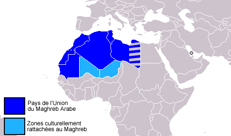 Grand Maghreb